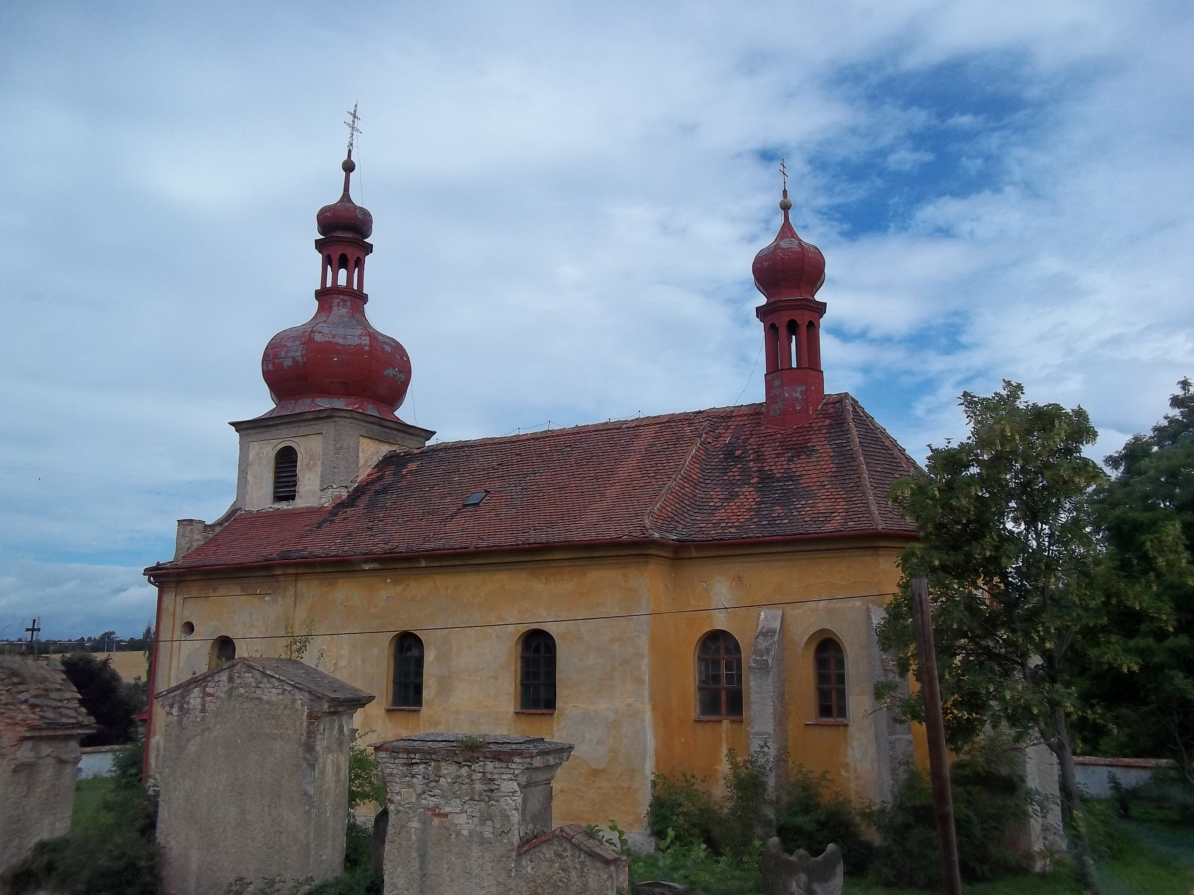 Kostel sv.Václava v Radíčevsi